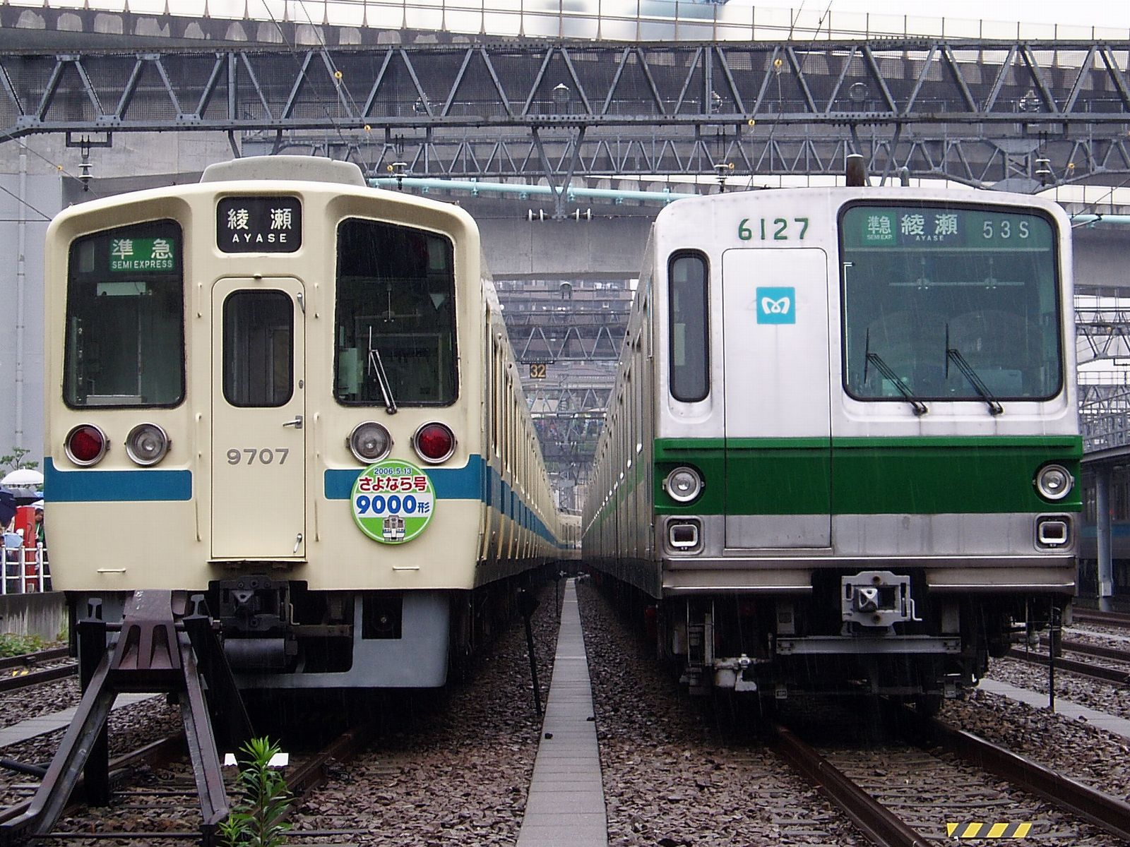 小田急9000形電車のさよなら運転後のイベントにて